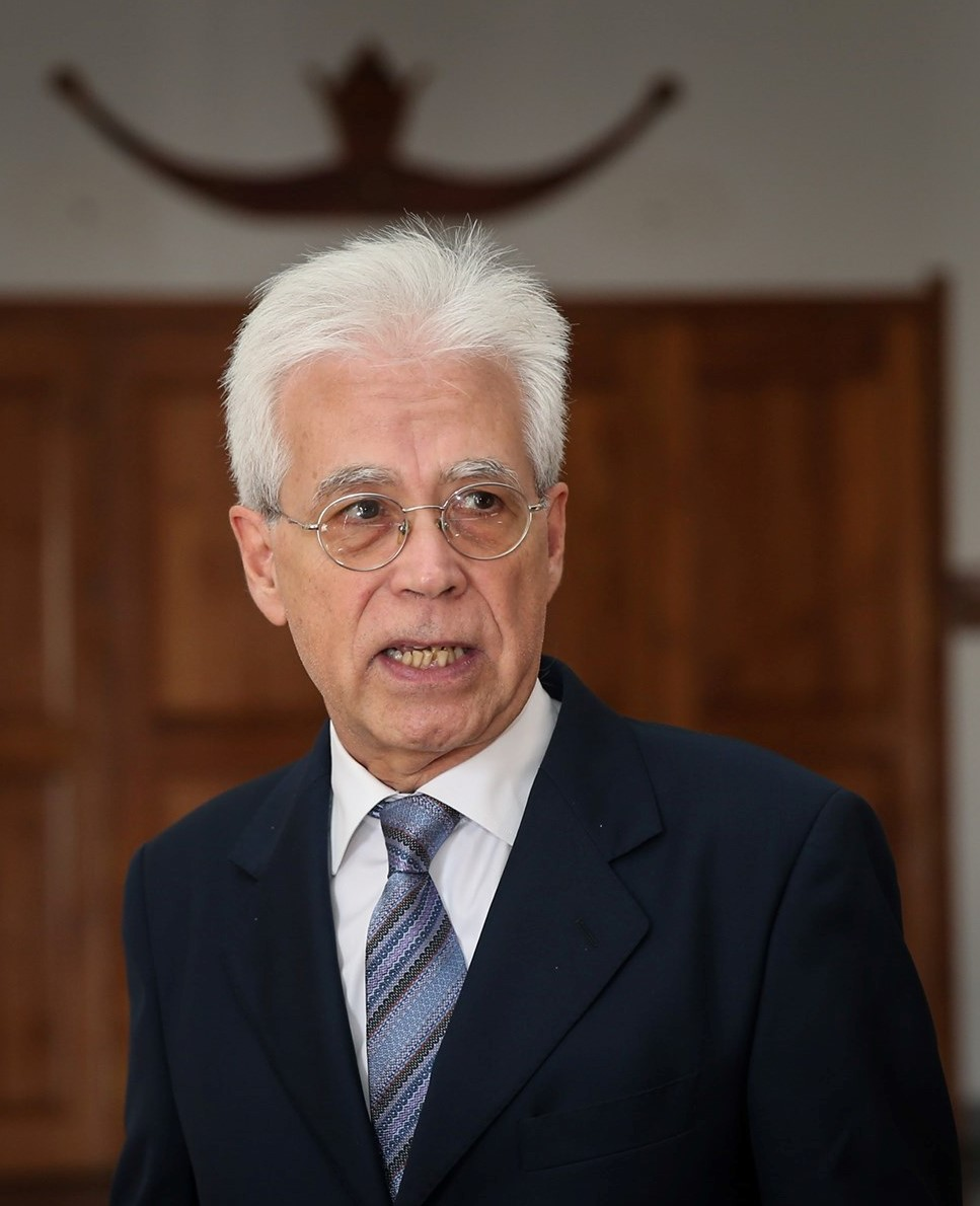 Vittorio Sandalli unter einer Kaibauk im Präsidentenpalast Osttimors